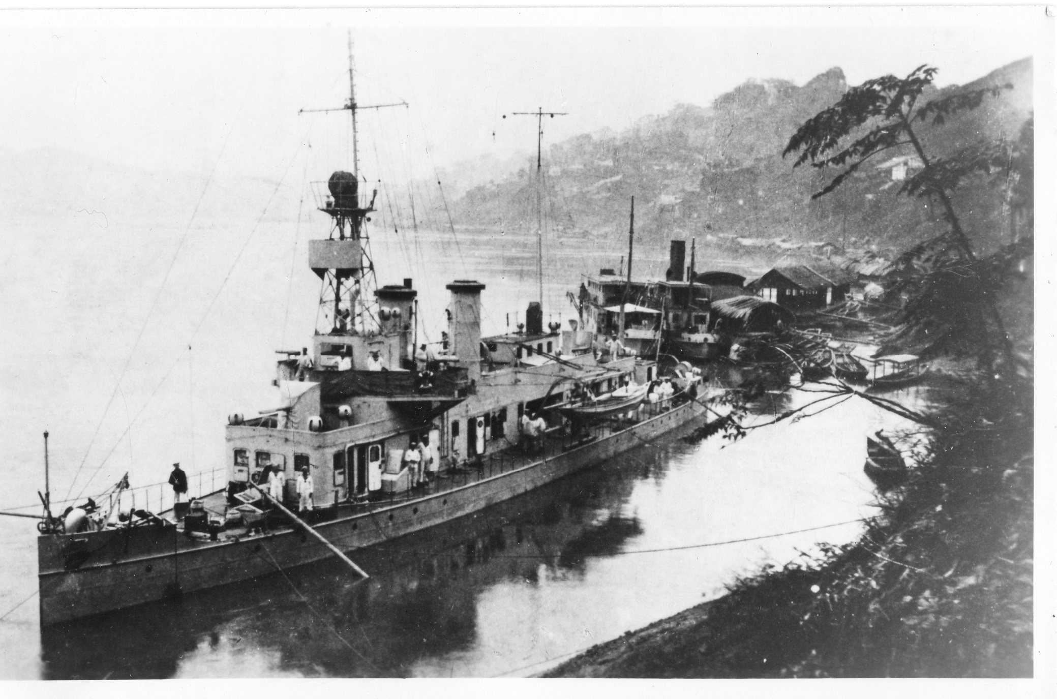 Kanonenboot SMS OTTER um 1910, vermutlich auf dem Jangtse-kiang. Aufnahmeort und Aufnahmedatum unbekannt